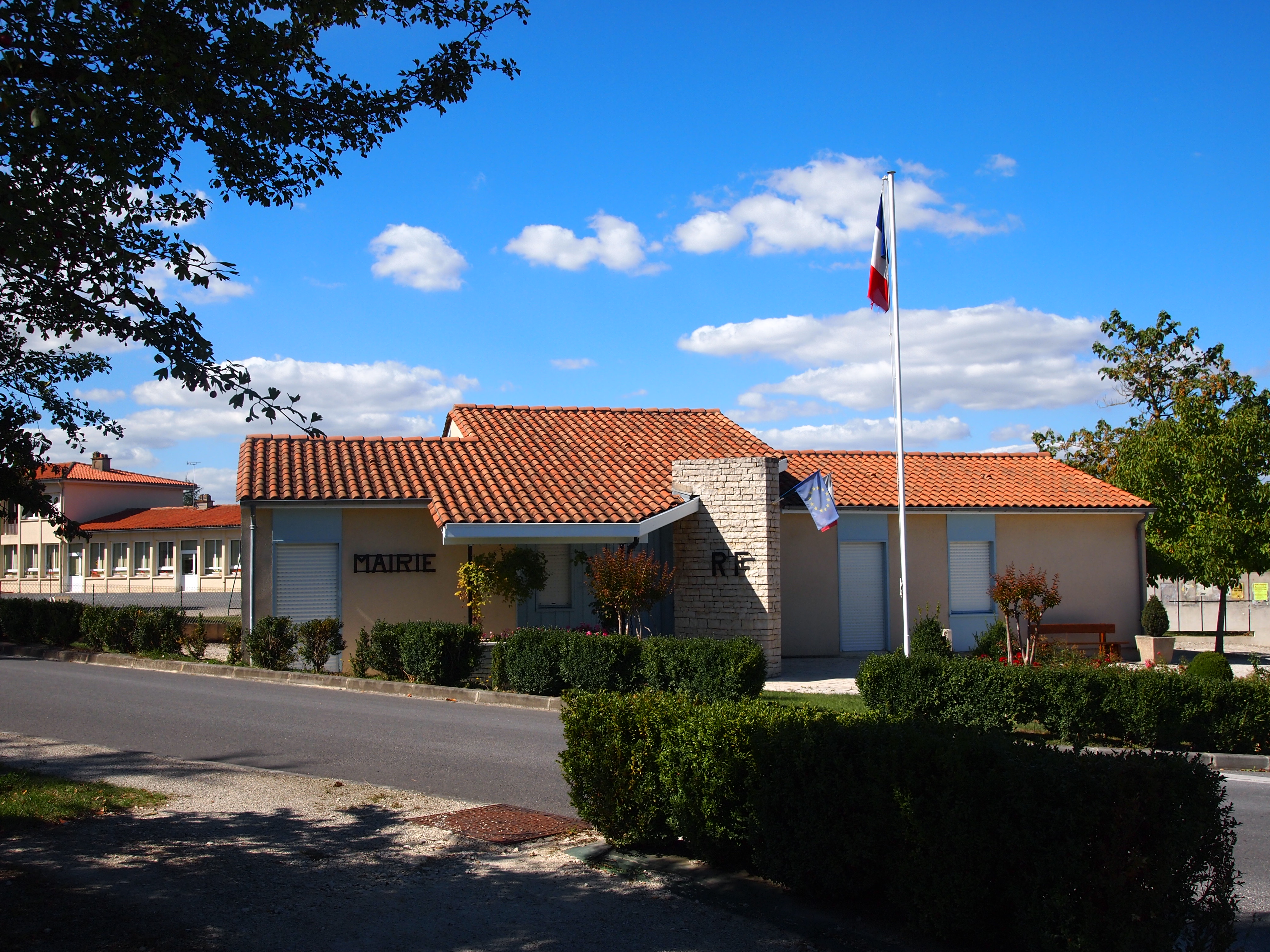 mairie de Fontclaireau en Charente (France)